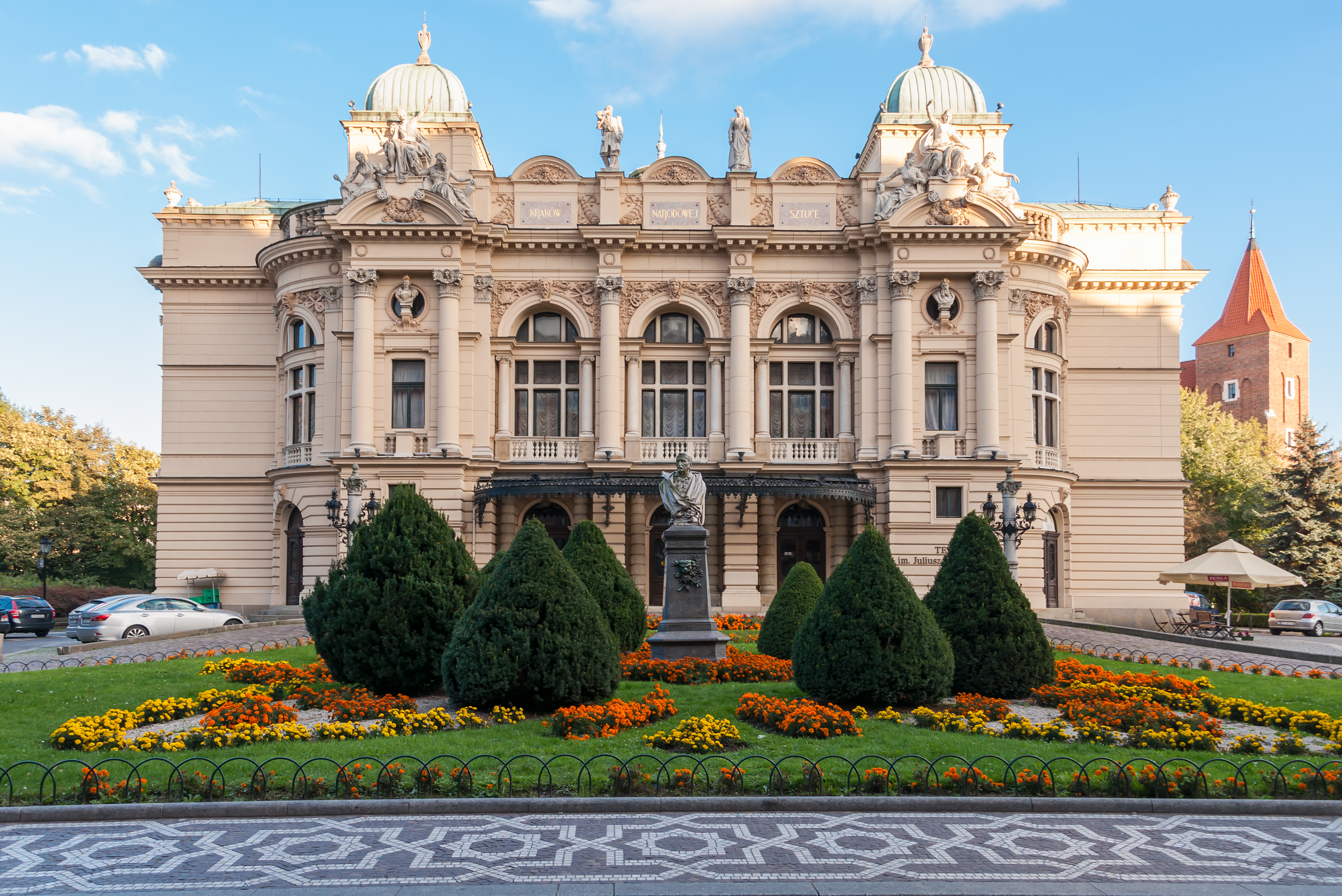 Kraków, pl. Św. Ducha 1 i 2. Teatr Miejski im. Słowackiego, 1891-1893.